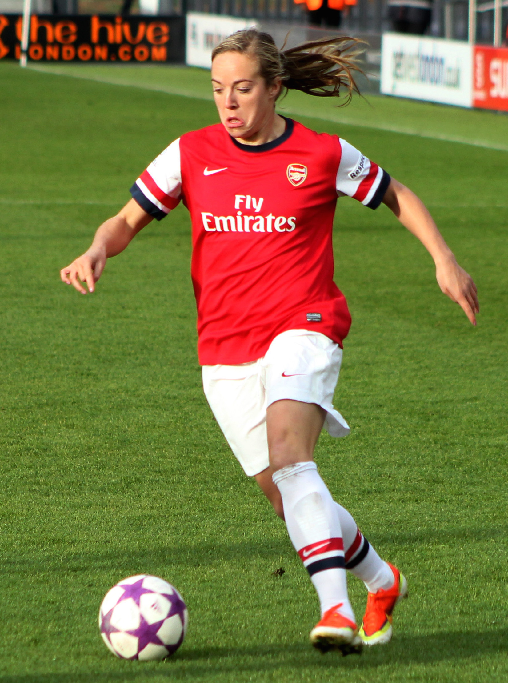 Gemma Davison